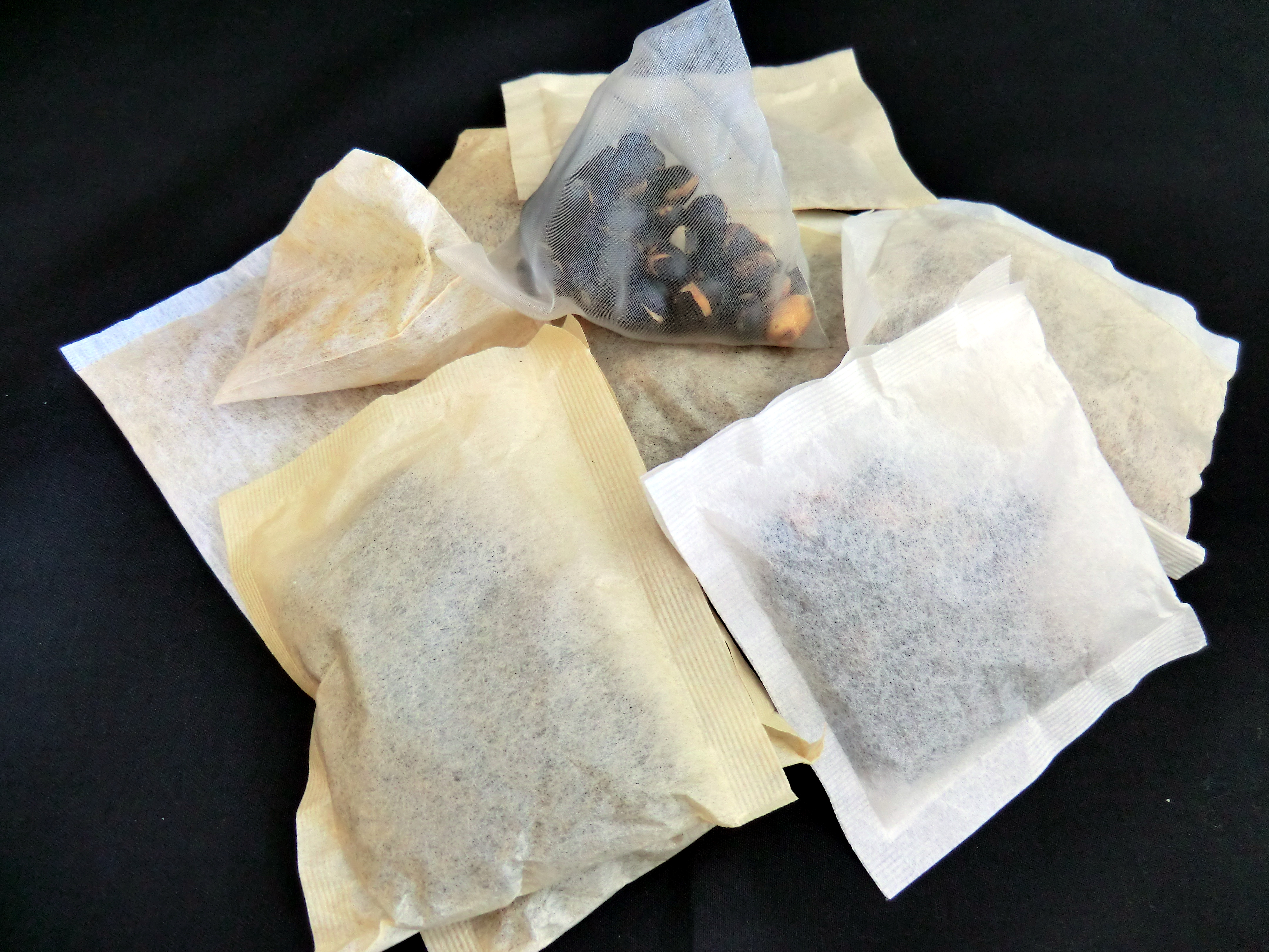 黒豆茶のティーパックいろいろ